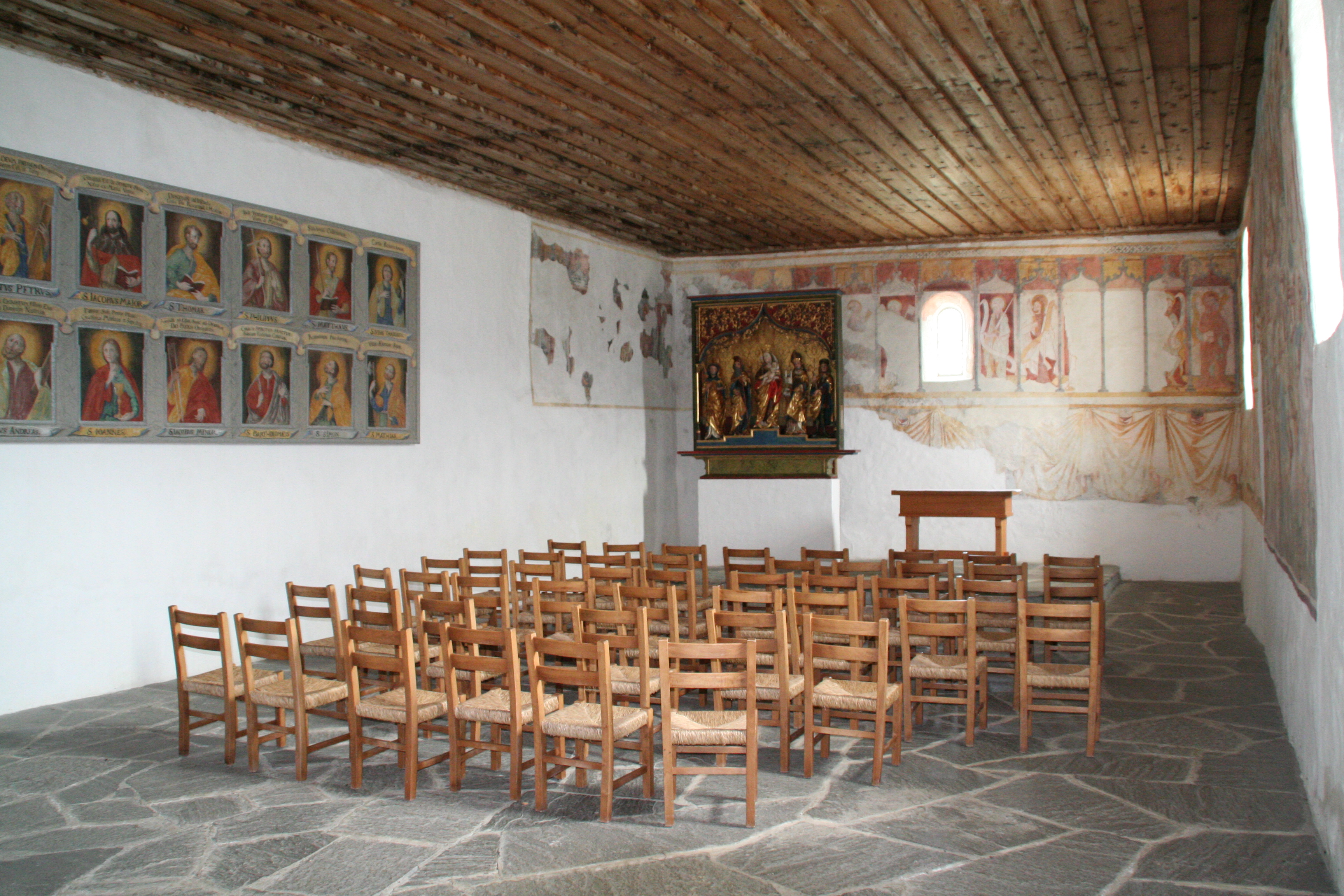 Kapelle St. Eusebius Innenraum